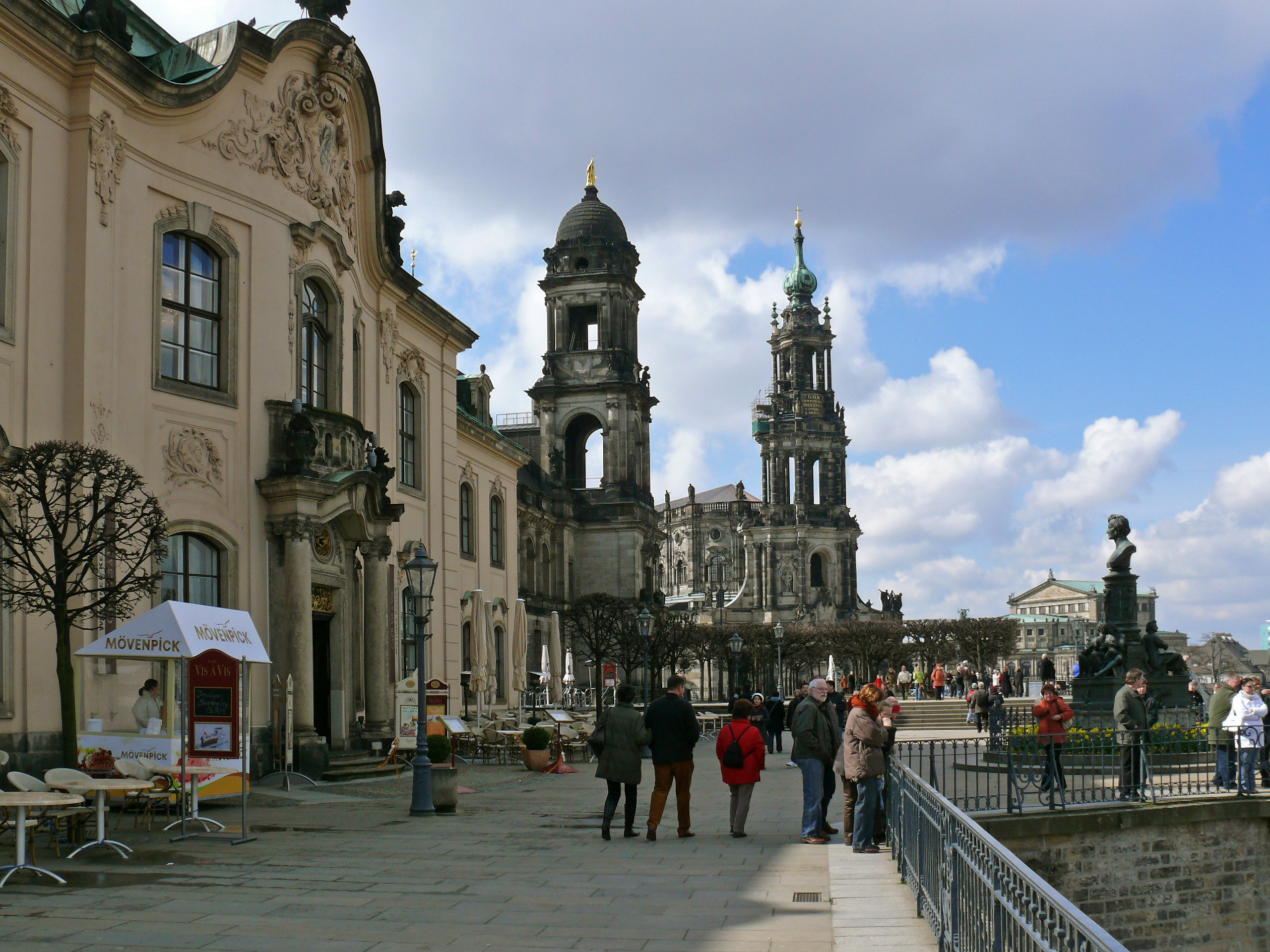 Brühlsche Terrasse in Dresden